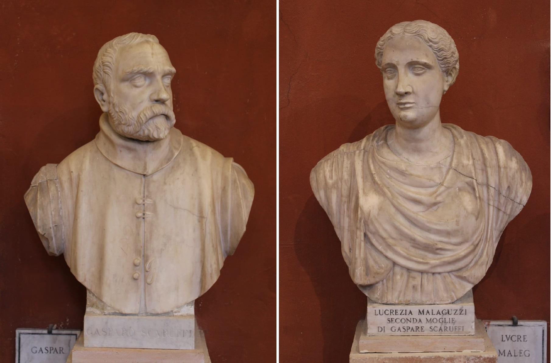 Sepolcro del Vescovo Rangone, marmo, Duomo di Reggio Emilia,1566